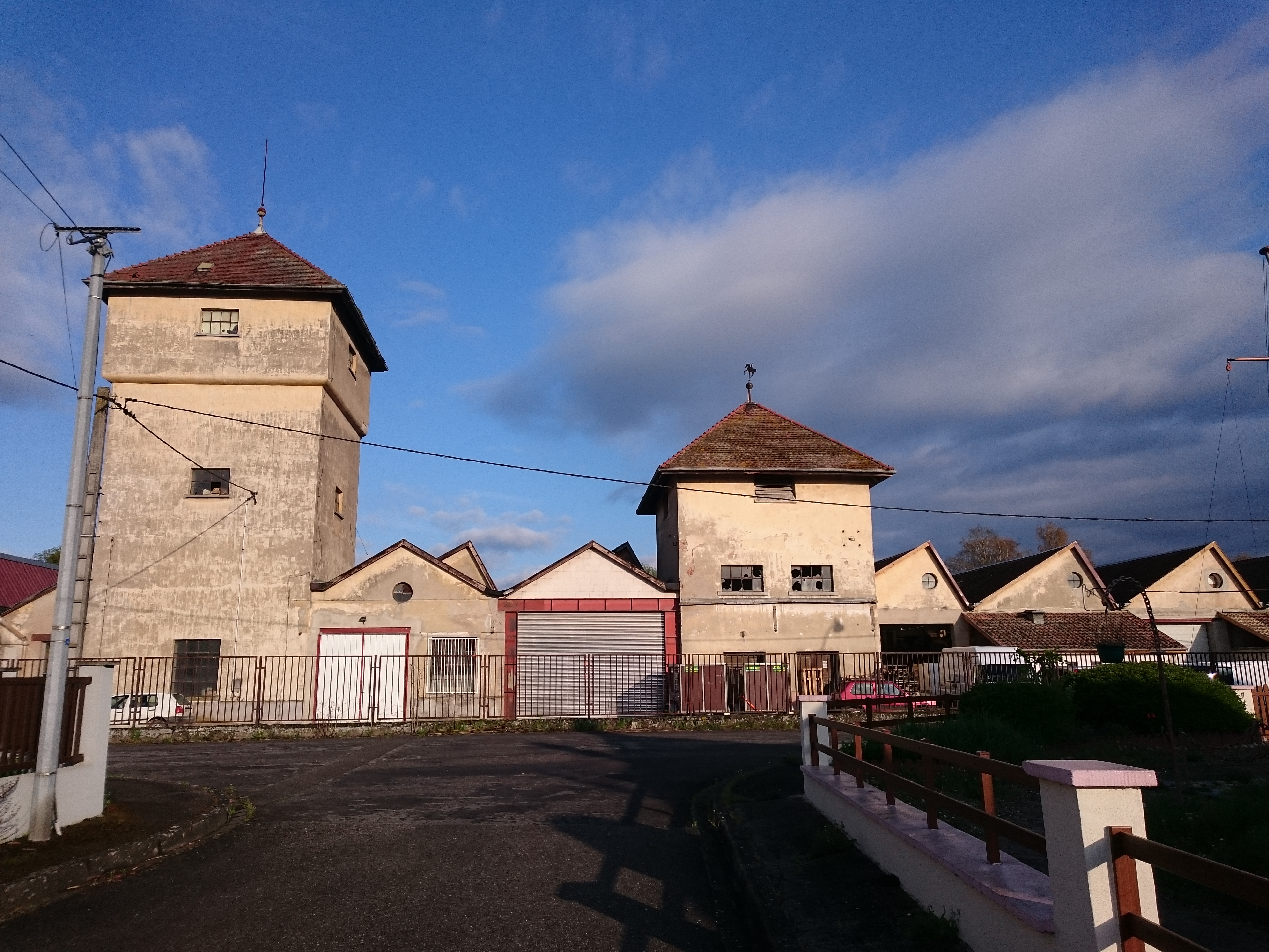 Usine List depuis la rue des Vosges (Rhinau)